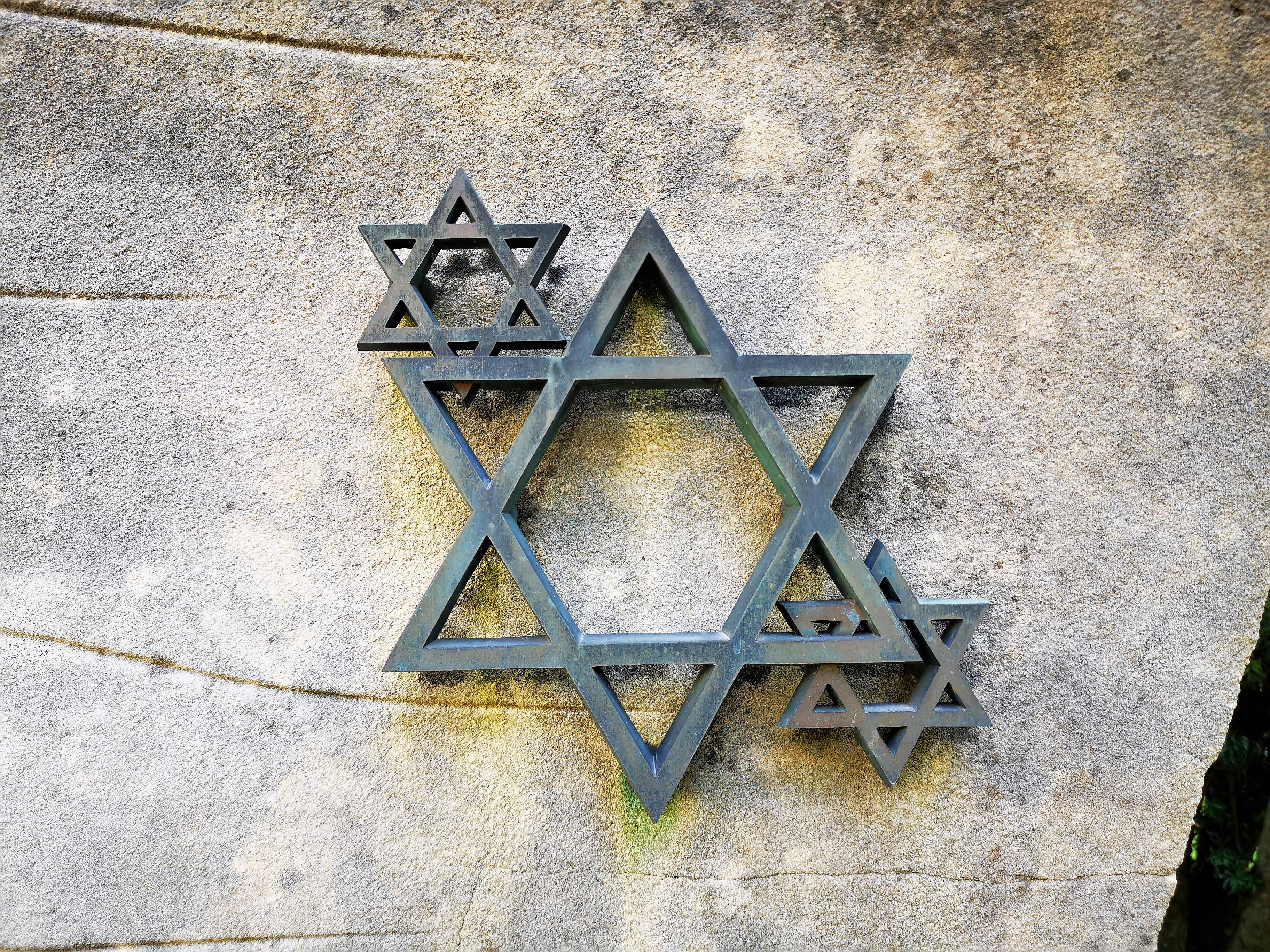 Luxembourg-Gasperich. Le Monument de la déportation civile et militaire les, 3 étailes de David.